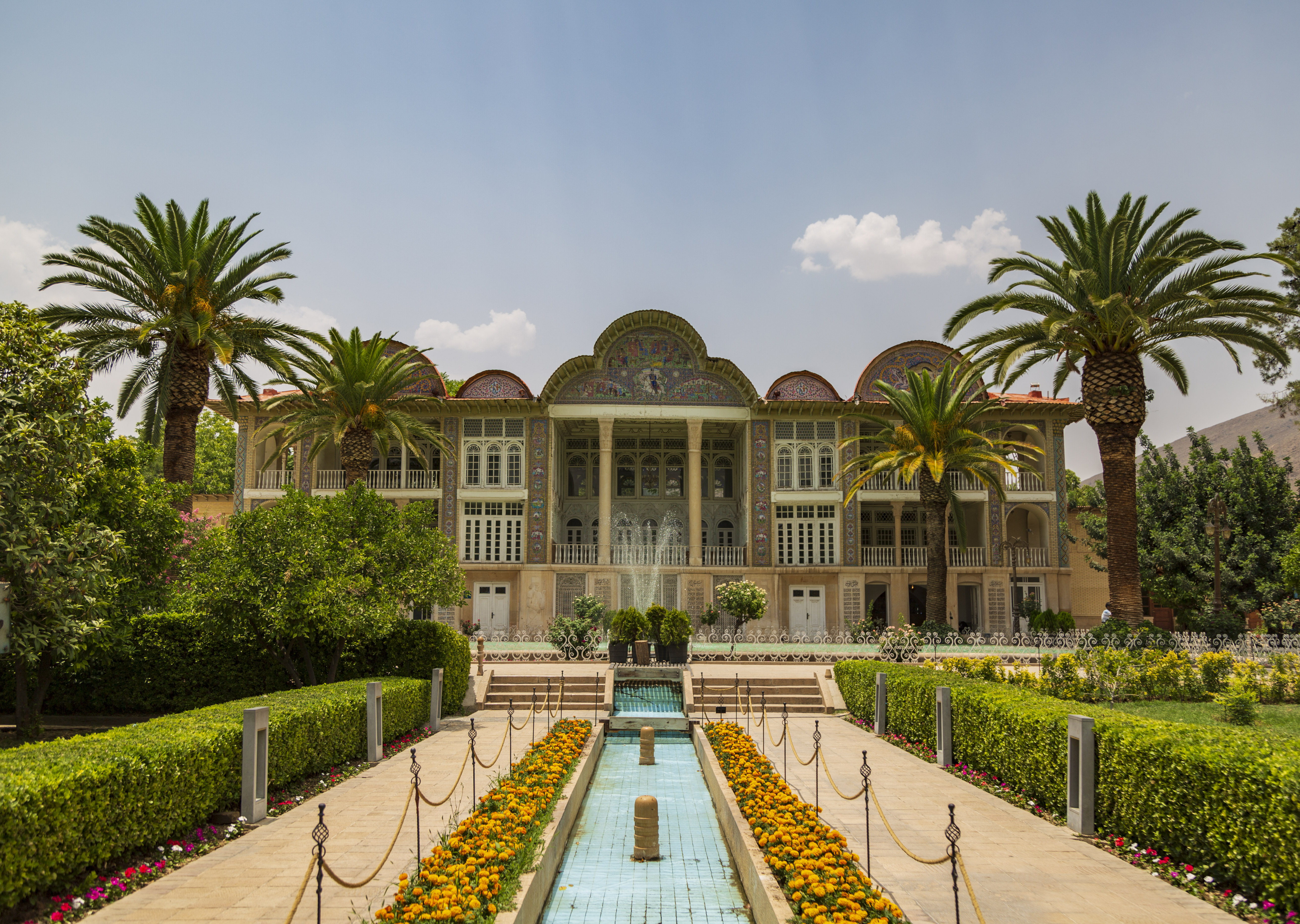 باغ ارم